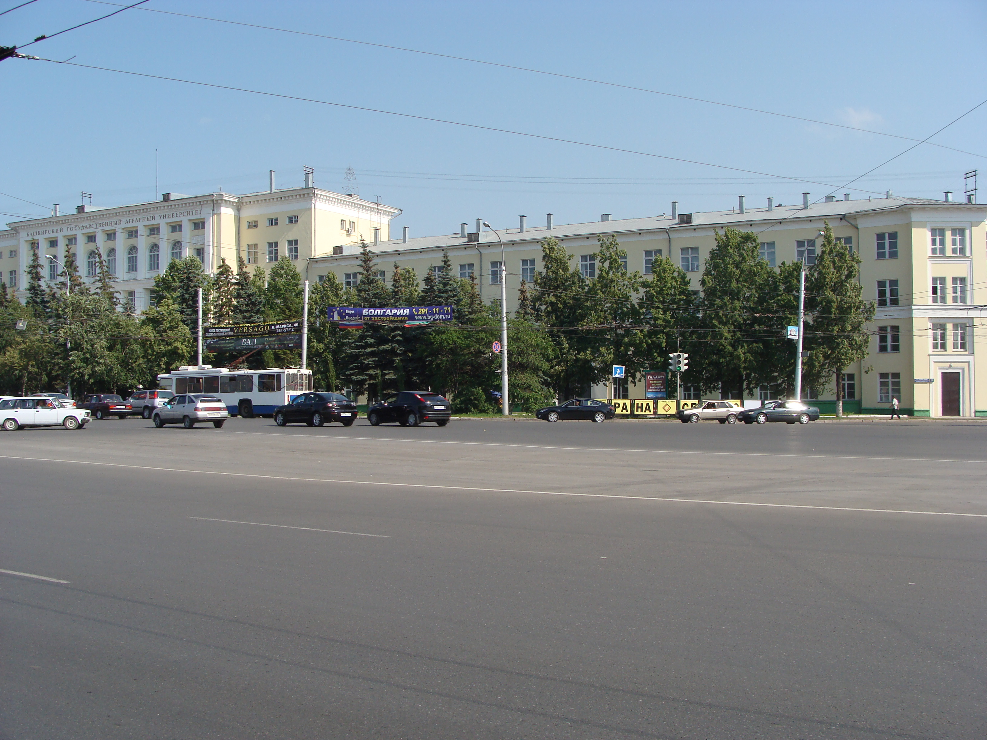 Аграрный университет